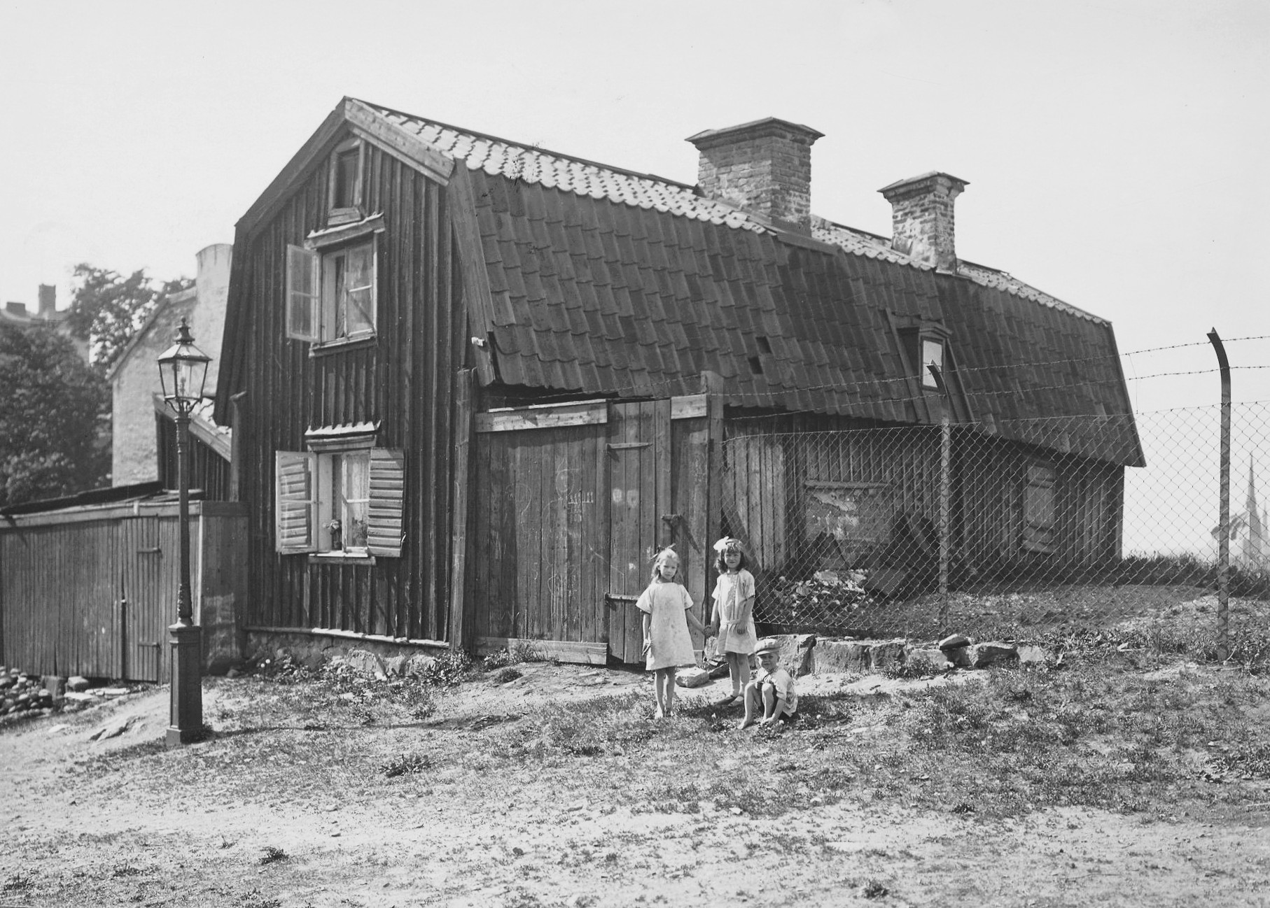 Nytorgsgatan 7 (dagens fastighet Terrassen 16)